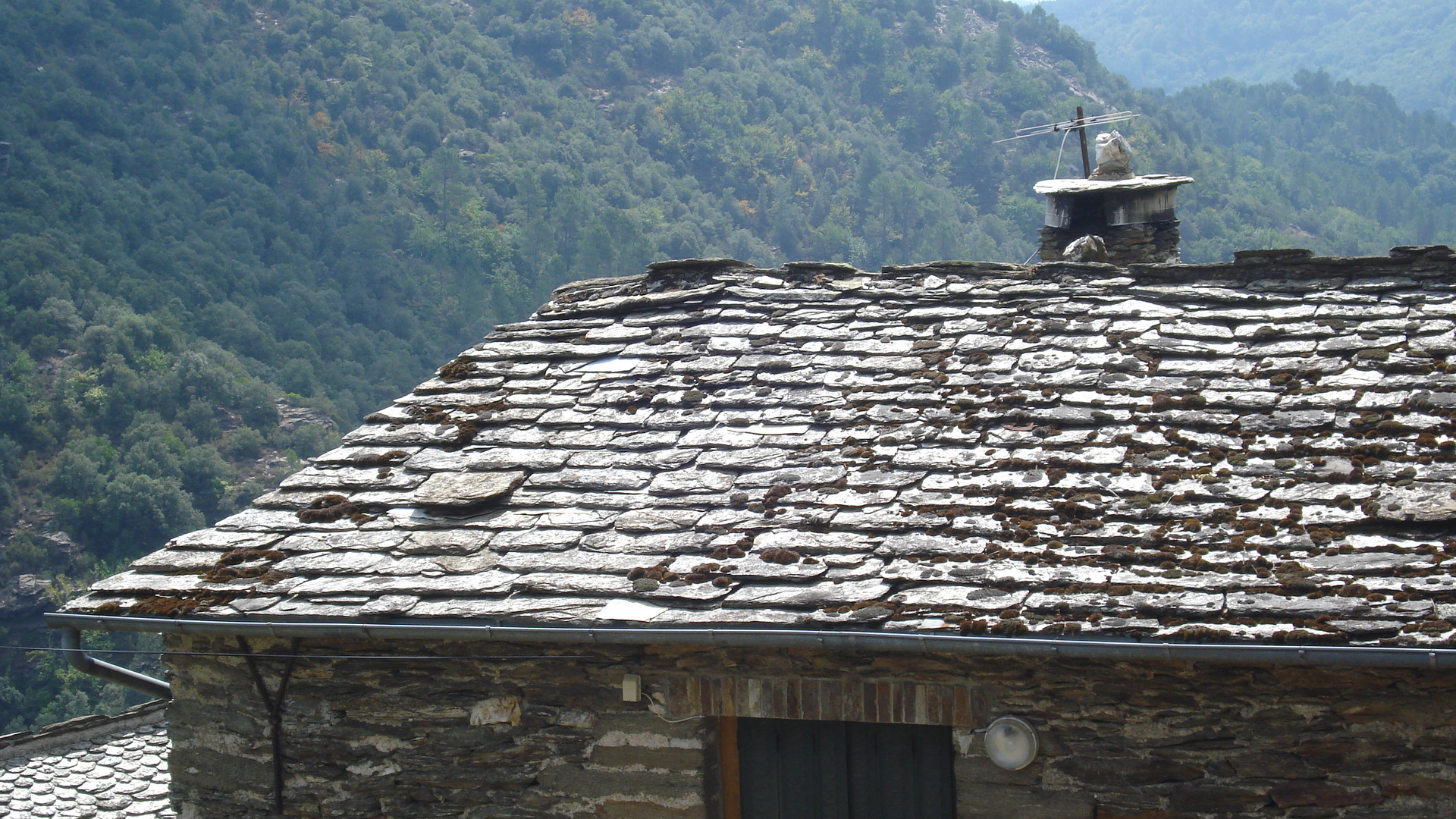 un toit de lauze à Saint Germain de Calberte , Lozère